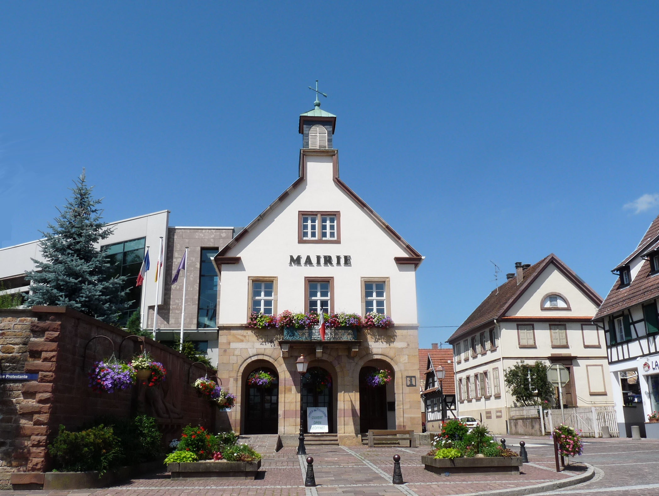 Mairie de Betschdorf (Bas-Rhin)